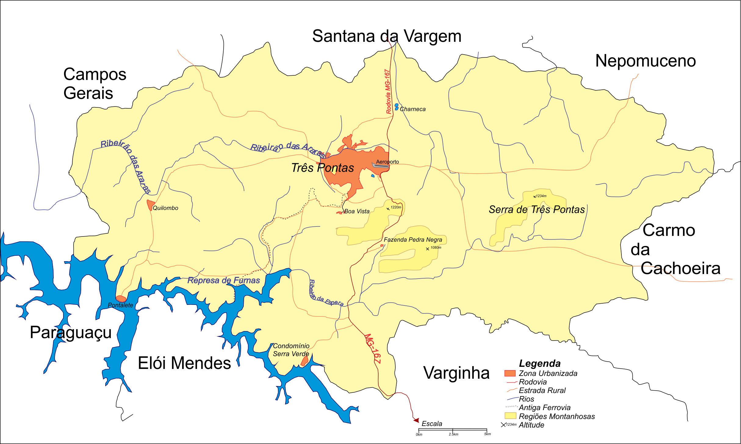 Este mapa mostra as principais características do município de Três Pontas.